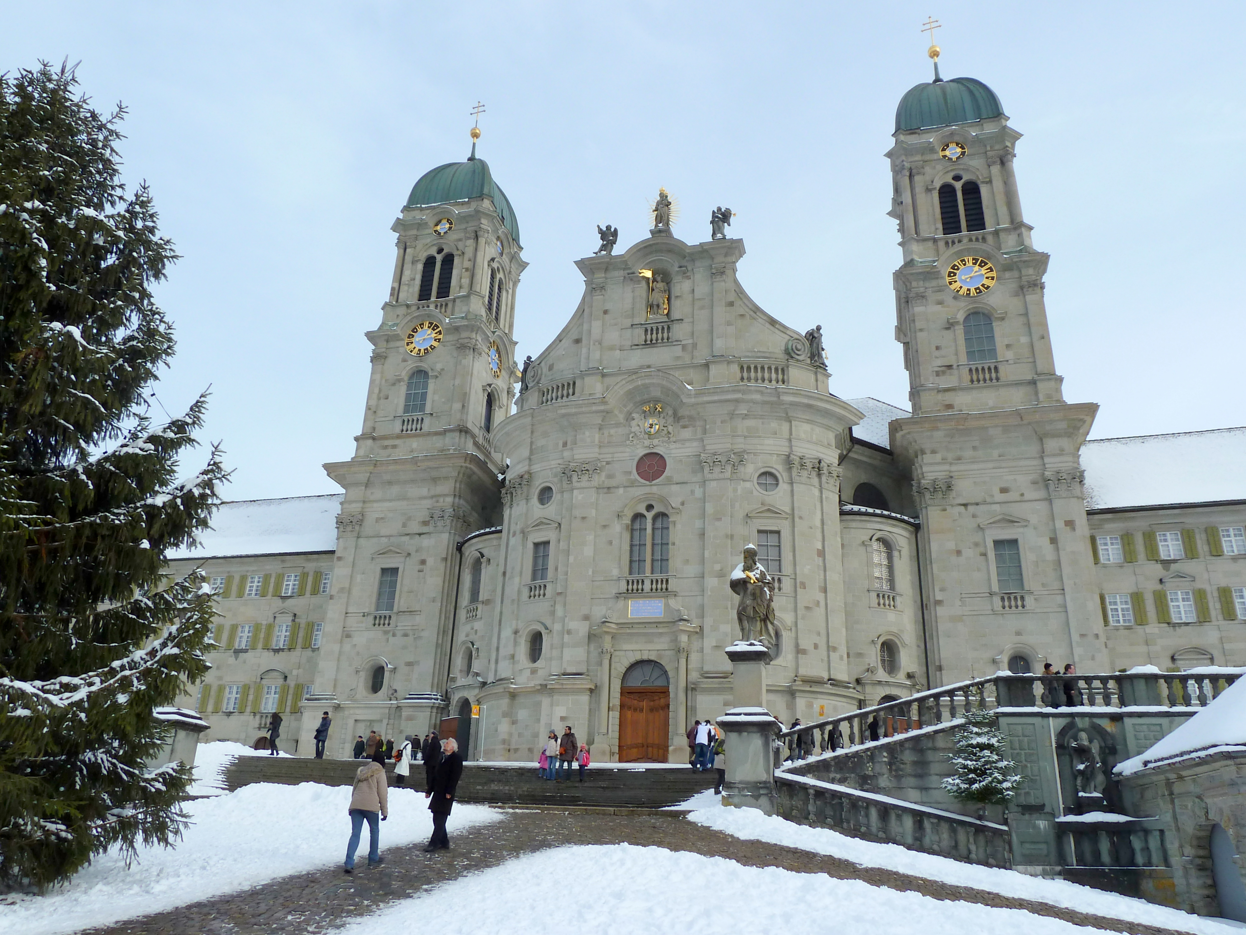 Kirche des Benediktinerklosters in Einsiedeln, Kanton Schwyz, Schweiz.